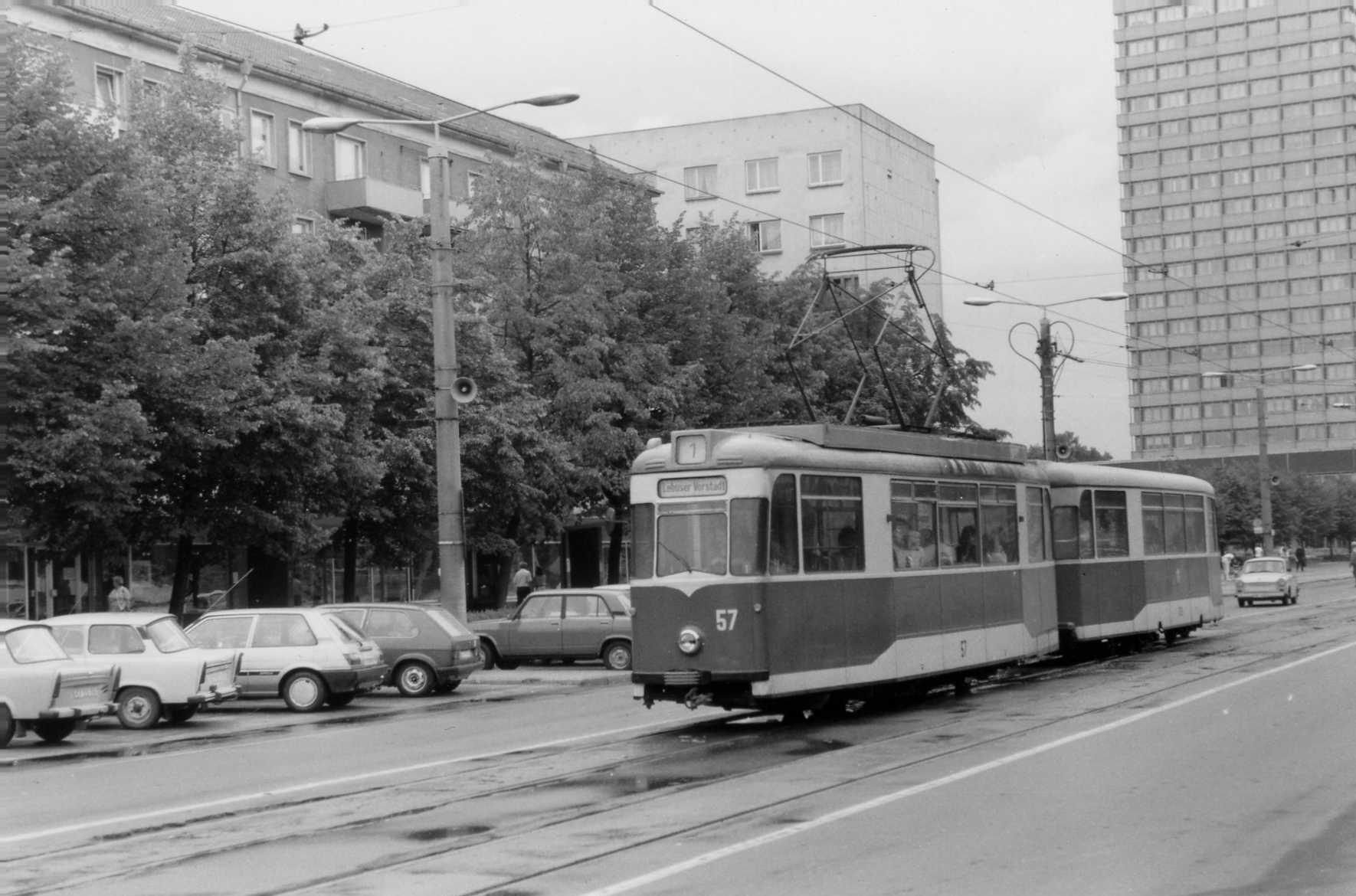 In Gotha gebaute Straßenbahn in der Karl-Marx-Straße in Frankfurt (Oder), Deutschland.